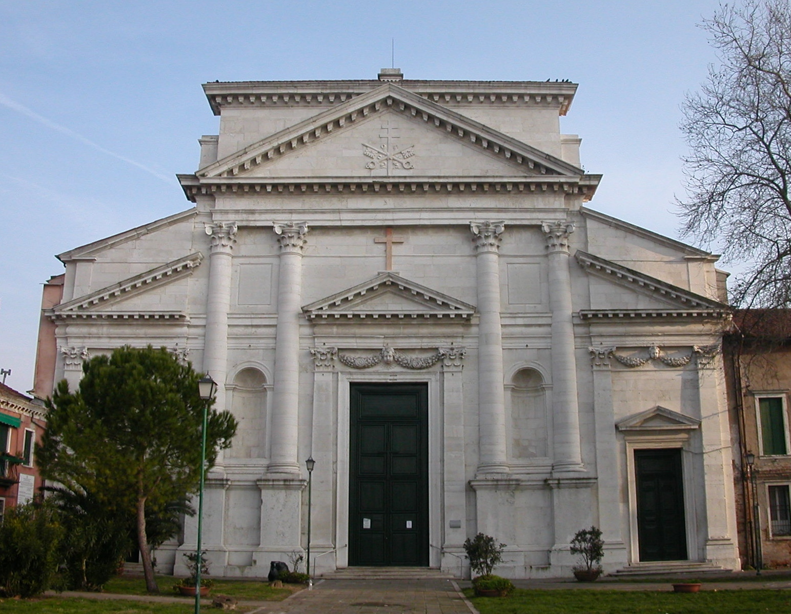 Church of San Pietro di Castello - Venice.